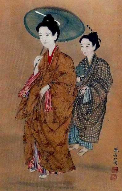 「傘をさす婦人の図」、琉球王国の美術、首里系の貴婦人を描いた絵。